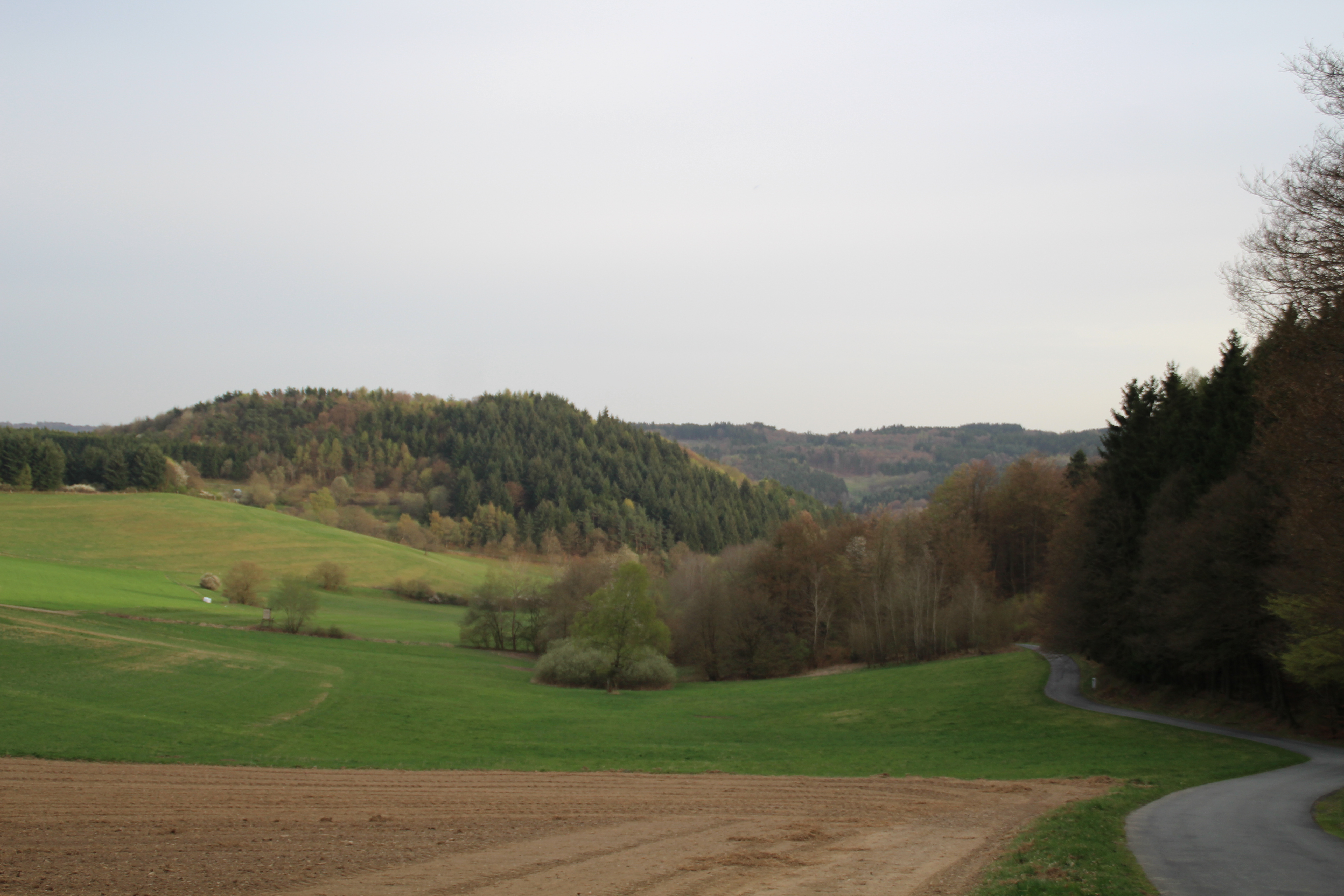 Salzbödequelle. Unterhalb des Ackers, der z.Zt. der Aufnahme gerade bearbeitet (geeggt?) wurde liegt die Salzweise, die als Quellgebiet der Salzböde gilt